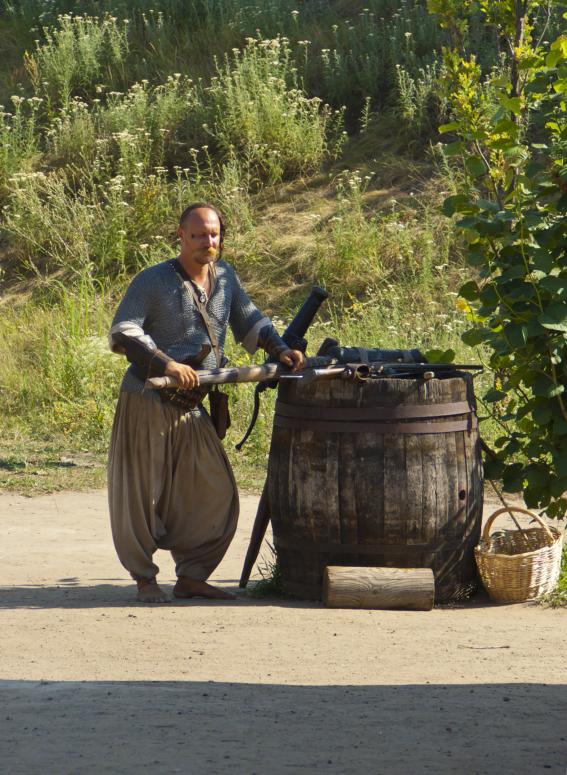 Національний заповідник „Хортиця”, Запоріжжя, острів Хортиця